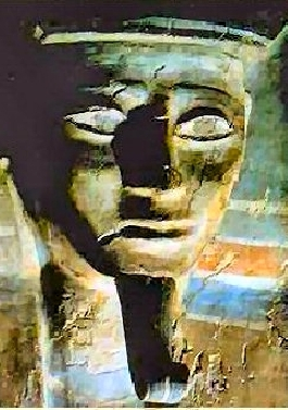 Cercueil du roi Kamosis (XVIIème dynastie égyptienne), Le Caire